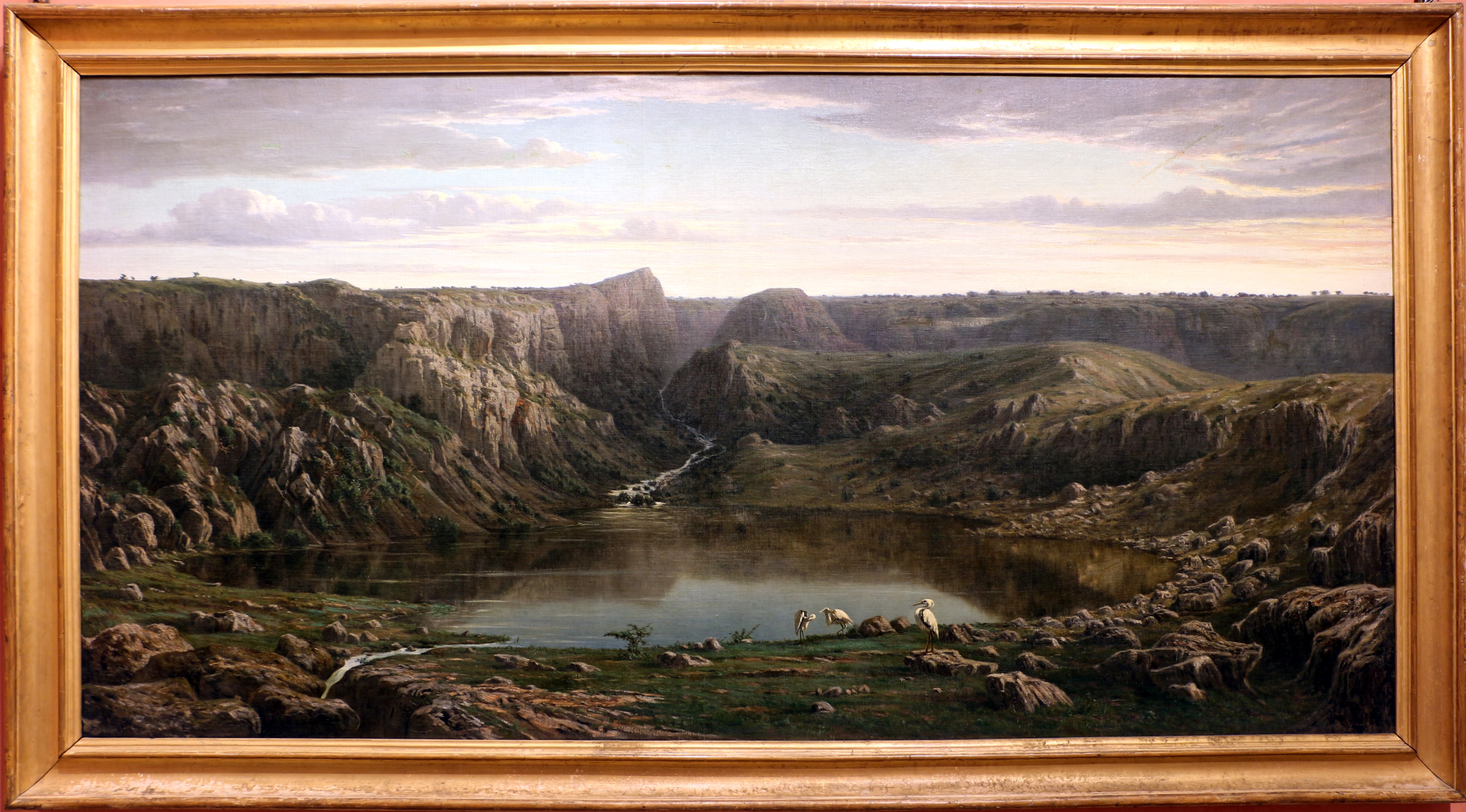 Pinacoteca civica di Reggio Calabria - paintings This is a photo of a monument which is part of cultural heritage of Italy.